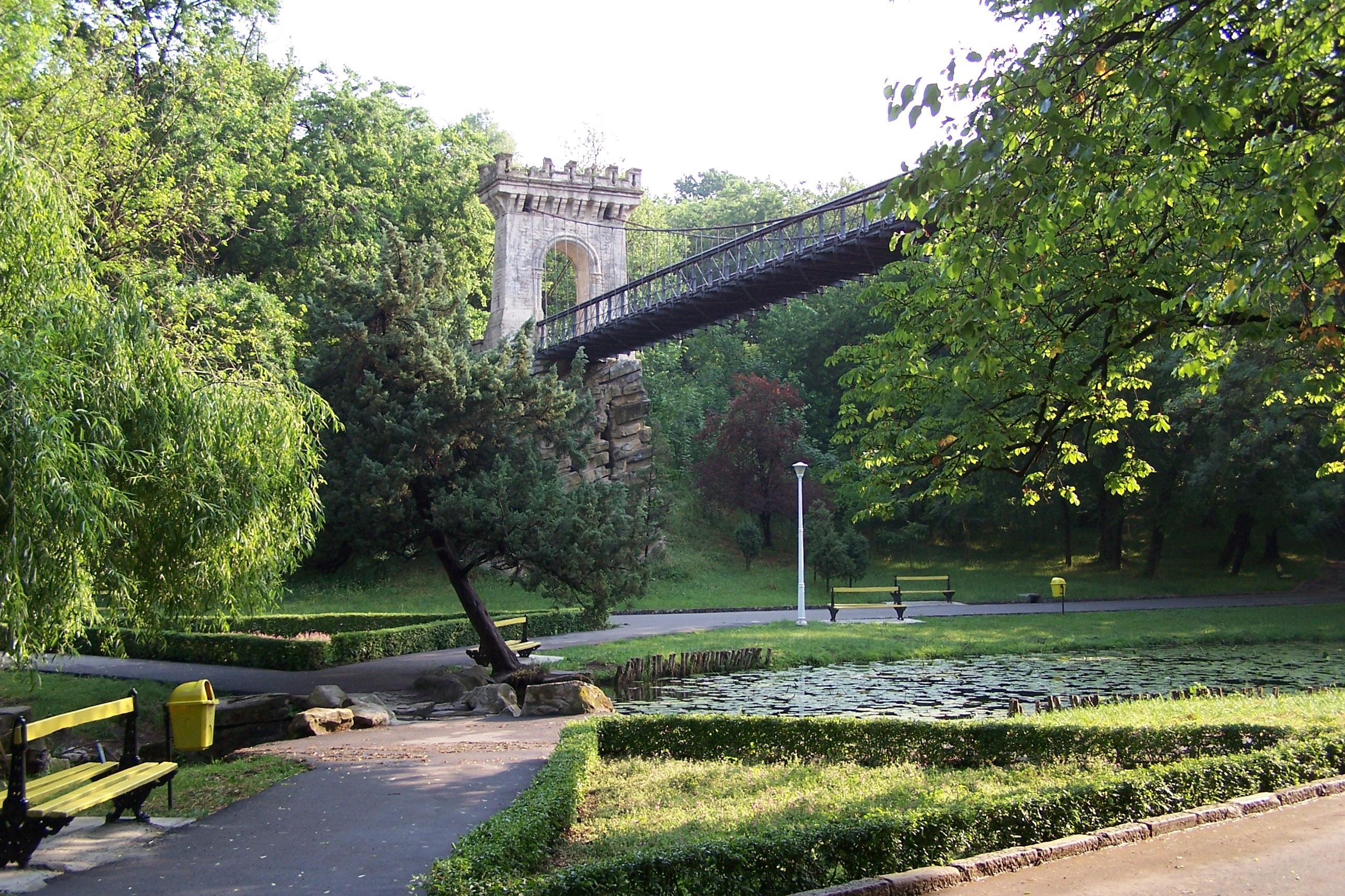 Craiova - Parcul Nicolae Romanescu - Podul suspendat